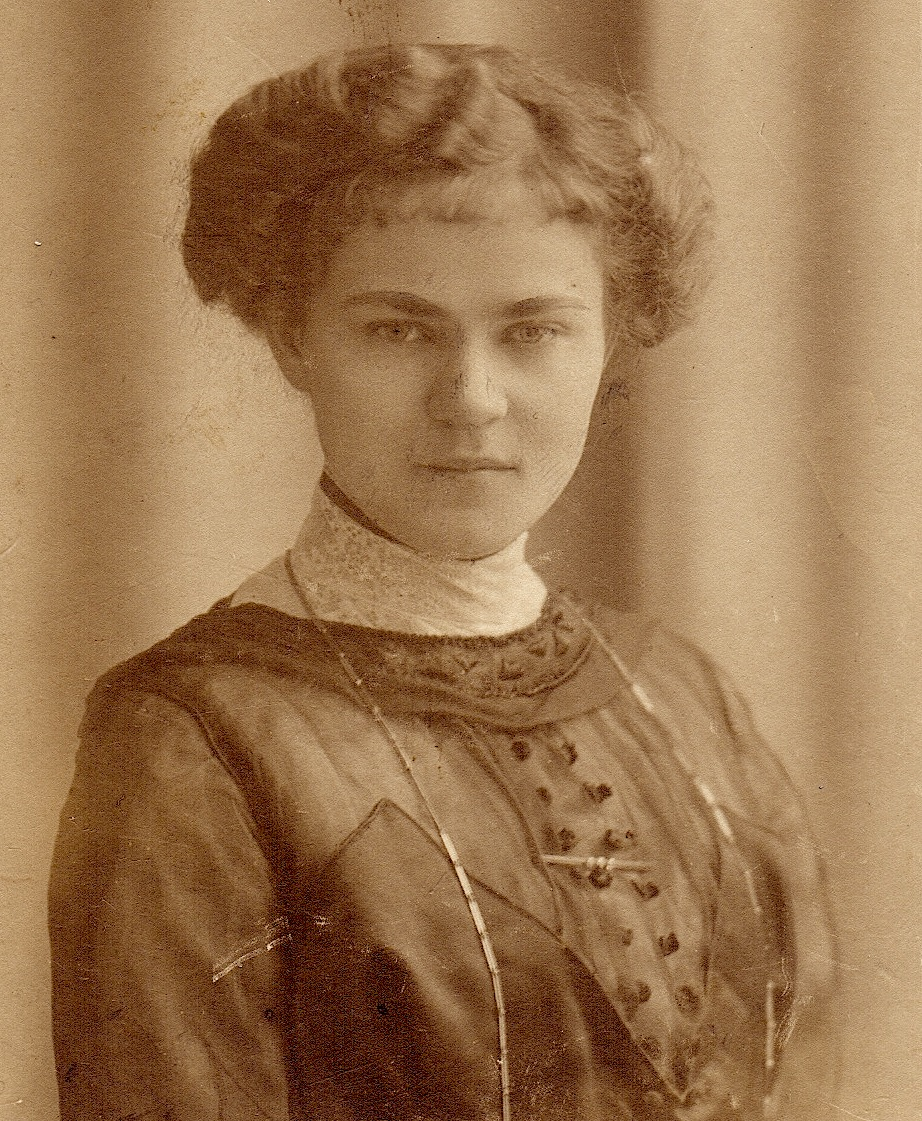 Karolina około 1913 r.